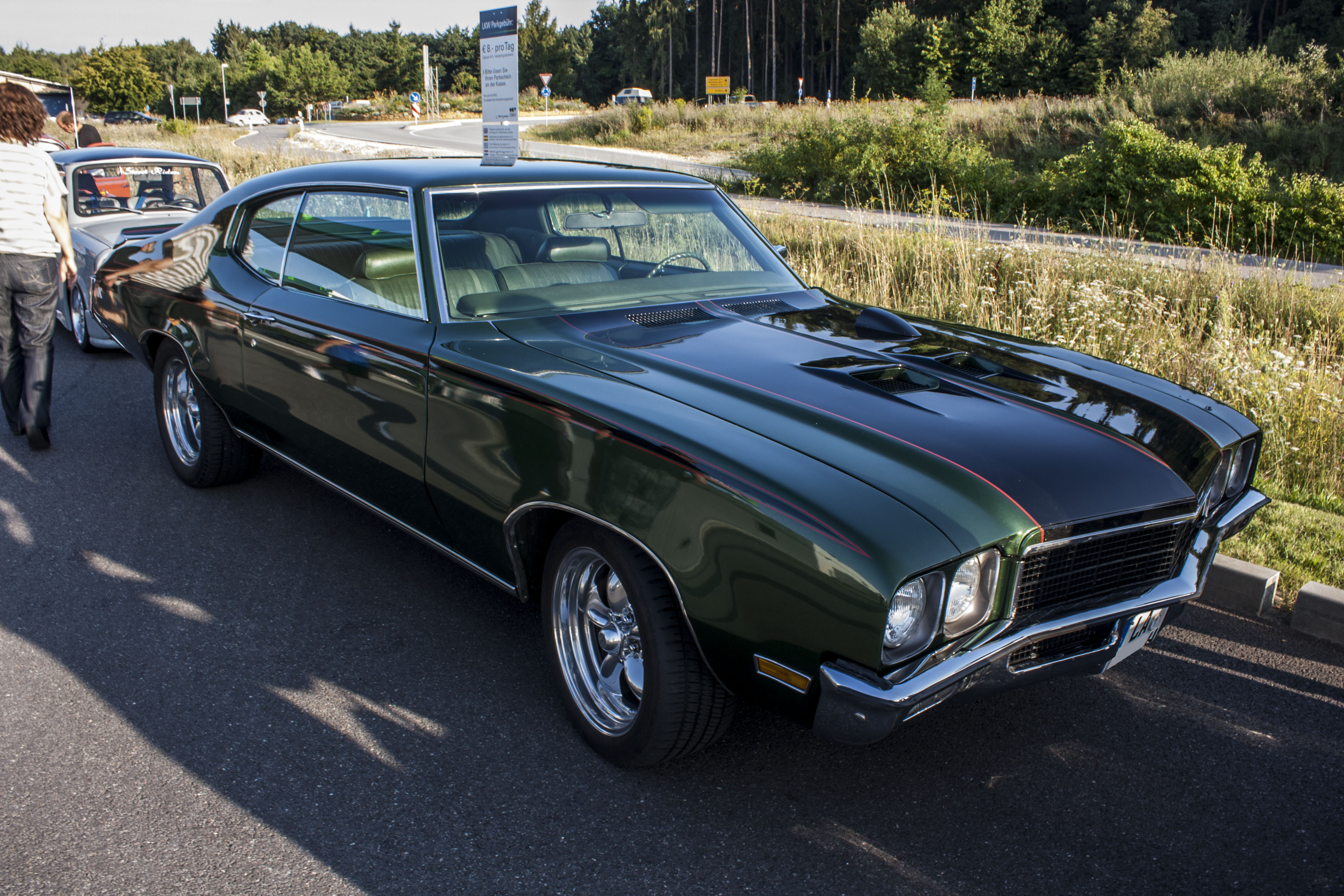 Buick GranSport GSX (1971/72)